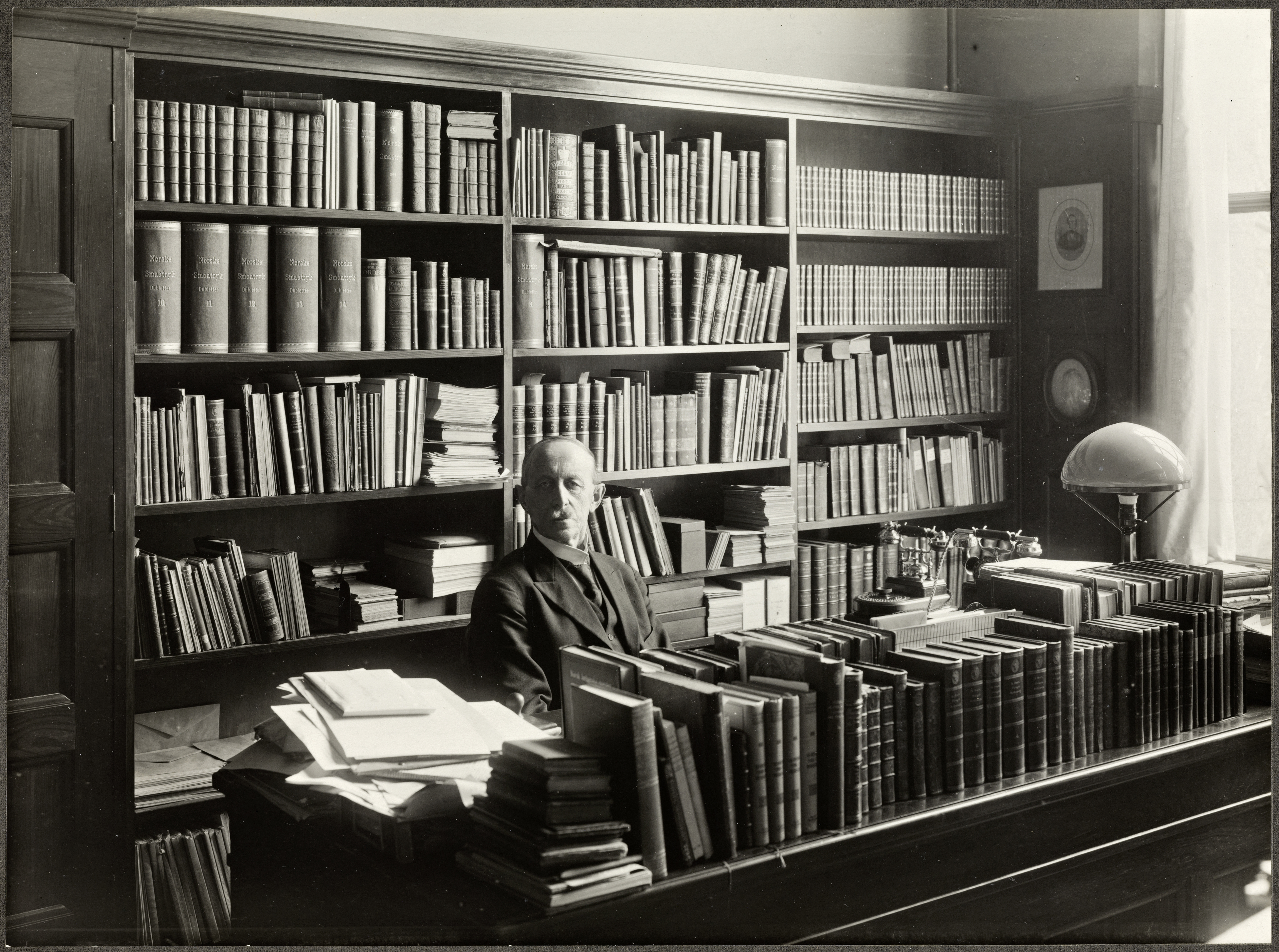 Beskrivelse / Description: Hjalmar Pettersen av bibliograf og bibliotekar. Fra 1898-1926 var han førstebibliotekar og leder av Norske avdeling ved Universitetsbiblioteket i Oslo. Dato / Date: 1926 Sted / Place: Oslo, Henrik Ibsens gate 110 Fotograf / Photographer: ukjent / unknown Digital kopi av original / Digital copy of original: s/h papirpositiv Eier / Owner Institution: Nasjonalbiblioteket / National Library of Norway Lenke / Link: Bildesignatur / Image Number: blds_06081